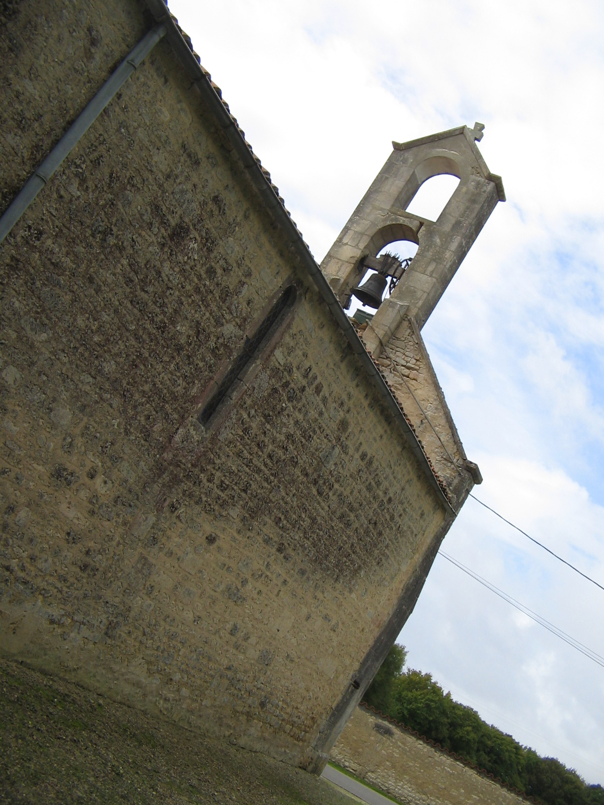 l'église de Chambon en charente maritime en octobre 2013